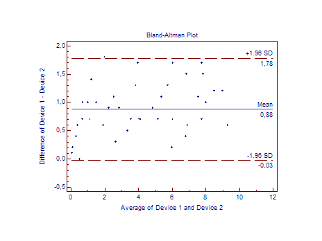 Beispiel eines Bland-Altman Diagramms